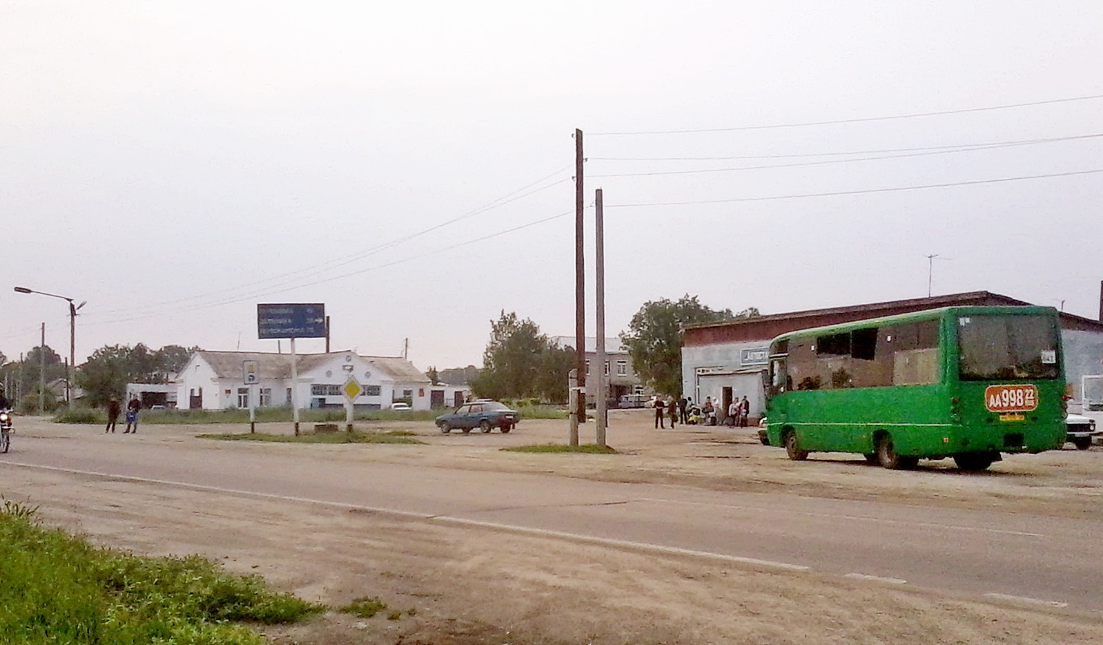 Село Староалейское Третьяковского района Алтайского края.